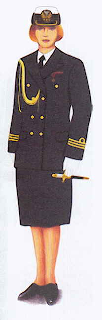 Rysunek ten pochodzi z załącznika do rozporządzenia ministra obrony narodowej z dnia 2 grudnia 2004 r. w sprawie wzorów oraz noszenia umundurowania i oznak wojskowych przez żołnierzy zawodowych i kandydatów na żołnierzy zawodowych.